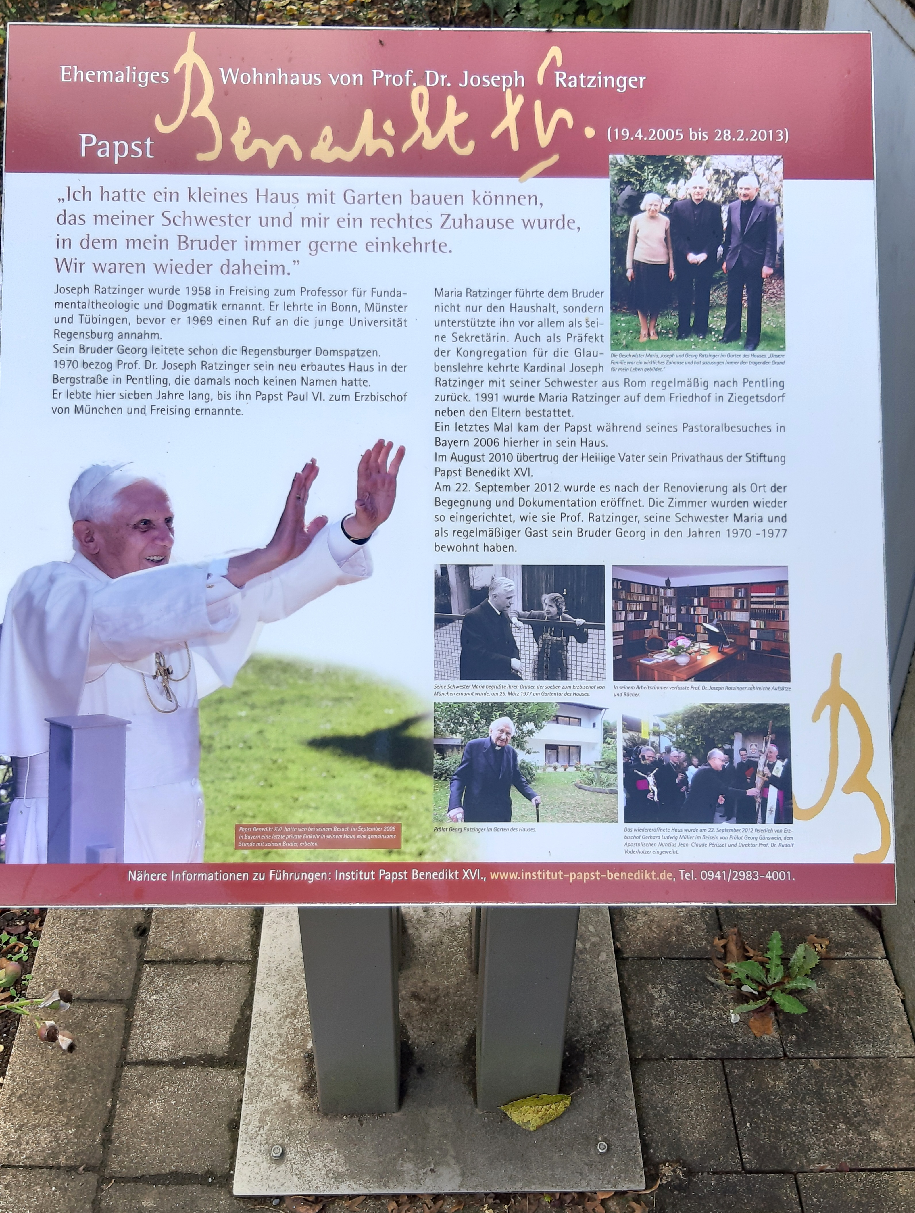 Das ehemalige Wohnhaus von Prof. Dr. Joseph Ratzinger, dem späteren Papst Benedikt XVI. in der Bergstraße 6, 93080 Pentling. Seit 2010 im Besitz der Stiftung Papst Benedikt XVI. Seit 2012 Ort der Begegnung und Dokumentation.